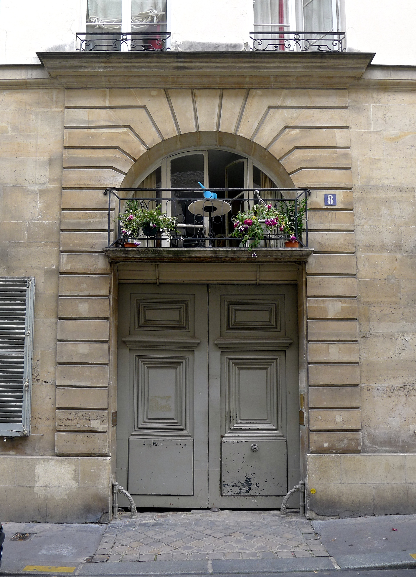 Rue des Moulins (immeuble n°8 MH) - Paris Ier .